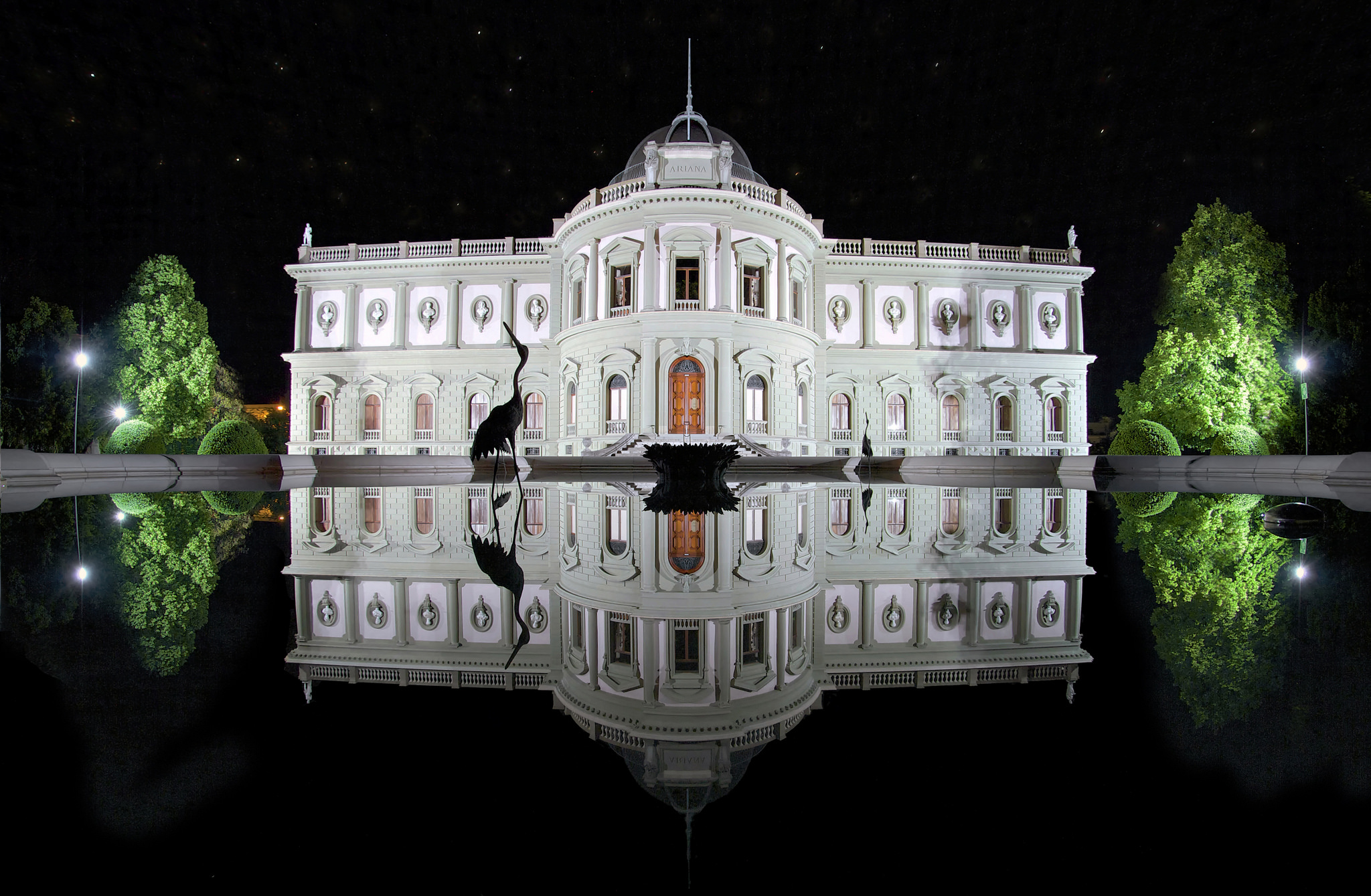 Musée Ariana, Genève